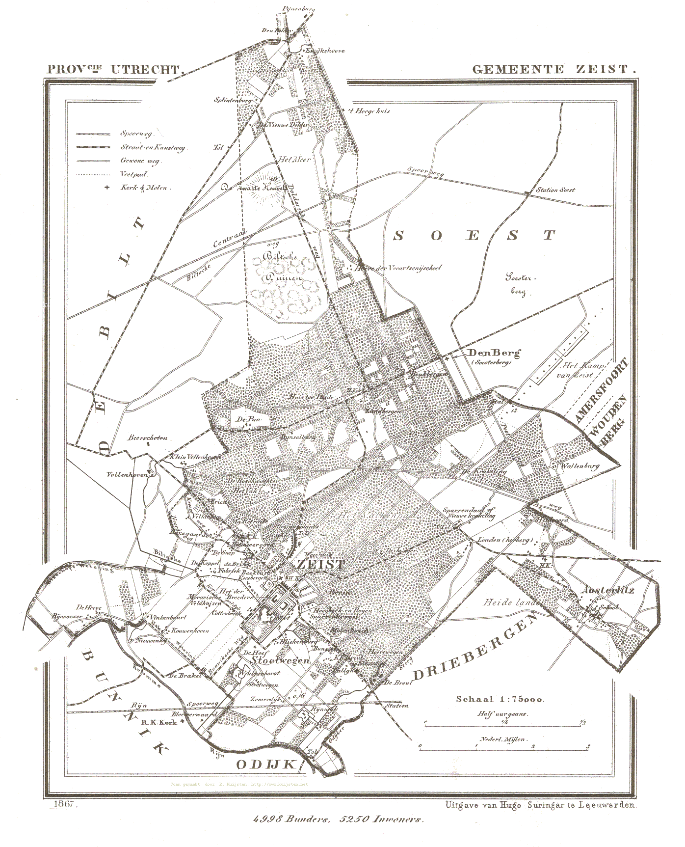 Kaart van Zeist uit Gemeente Atlas van Nederland, J. Kuyper 1865-1870, Uitgave Hugo Suringar Leeuwarden.